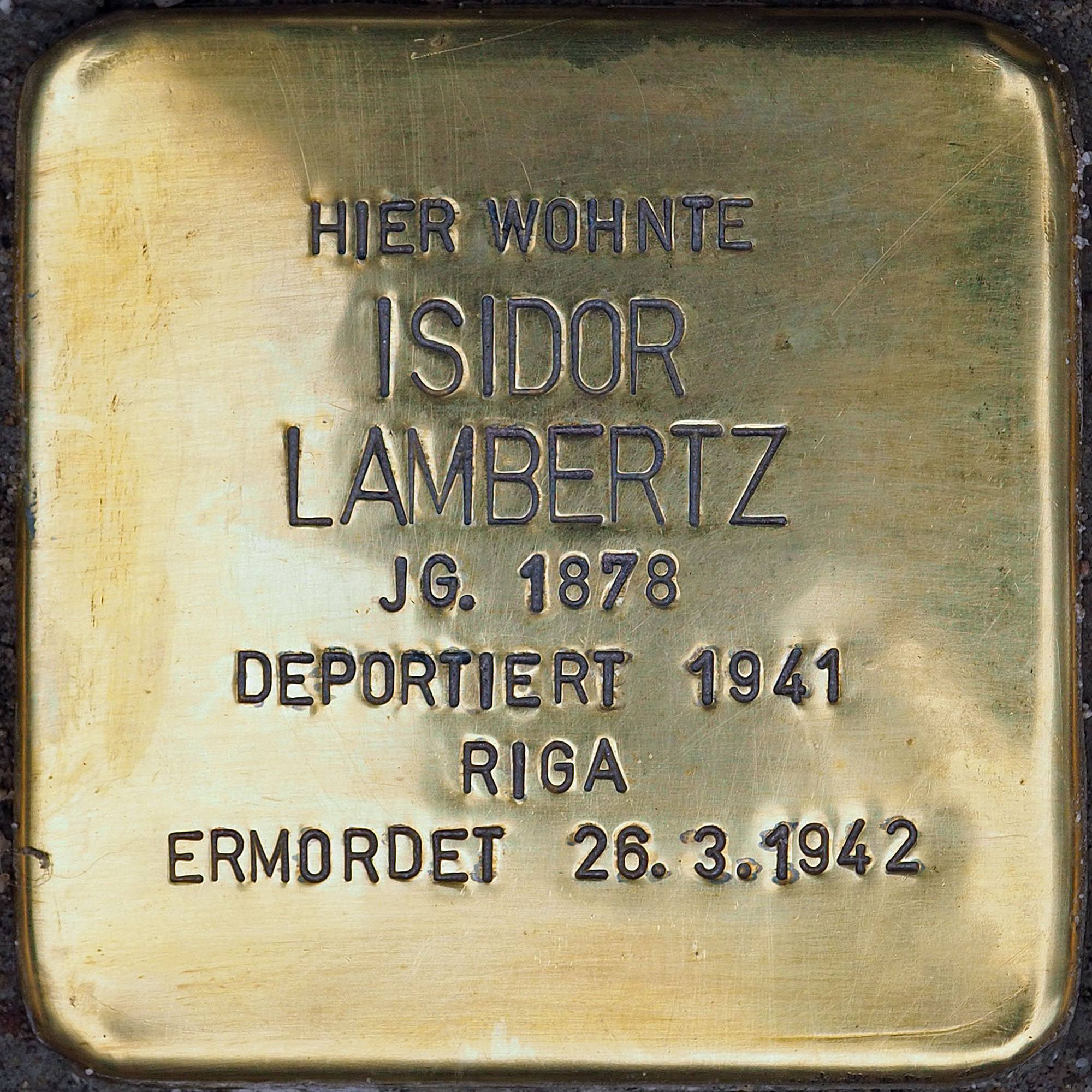 Stolpersteine in Kempen: Lambertz, Isidor